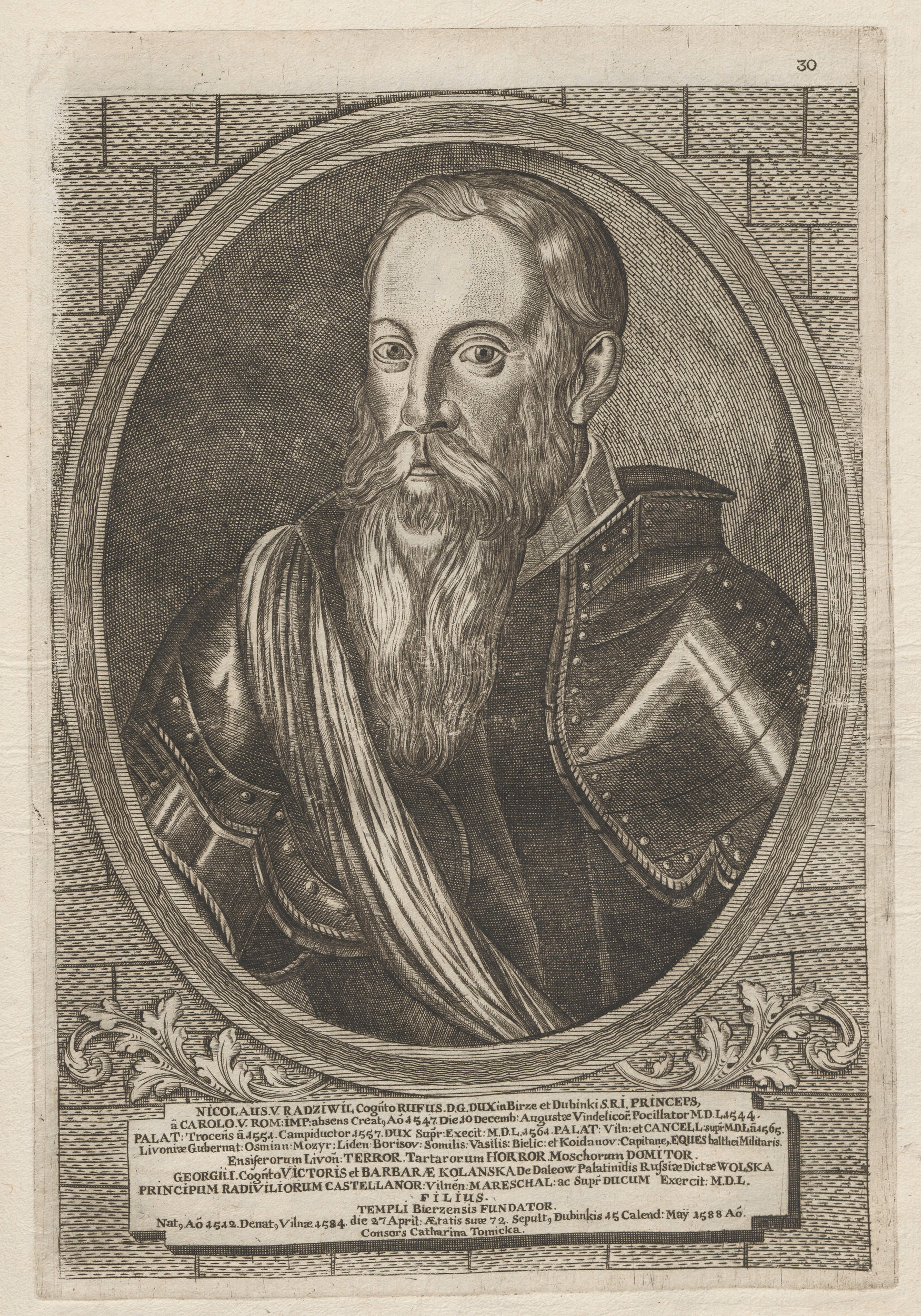 Беларуская (тарашкевіца): Партрэт Мікалая Радзівіла Рудога (Mikałaj Radzivił Rudy)